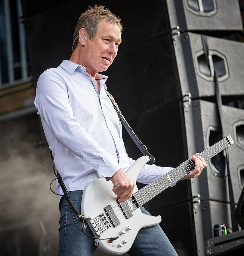 Status Quo during Wacken Open Air at Schleswig-Holstein, Wacken, , Germany on 2017-08-03, Photo: Sven Mandel